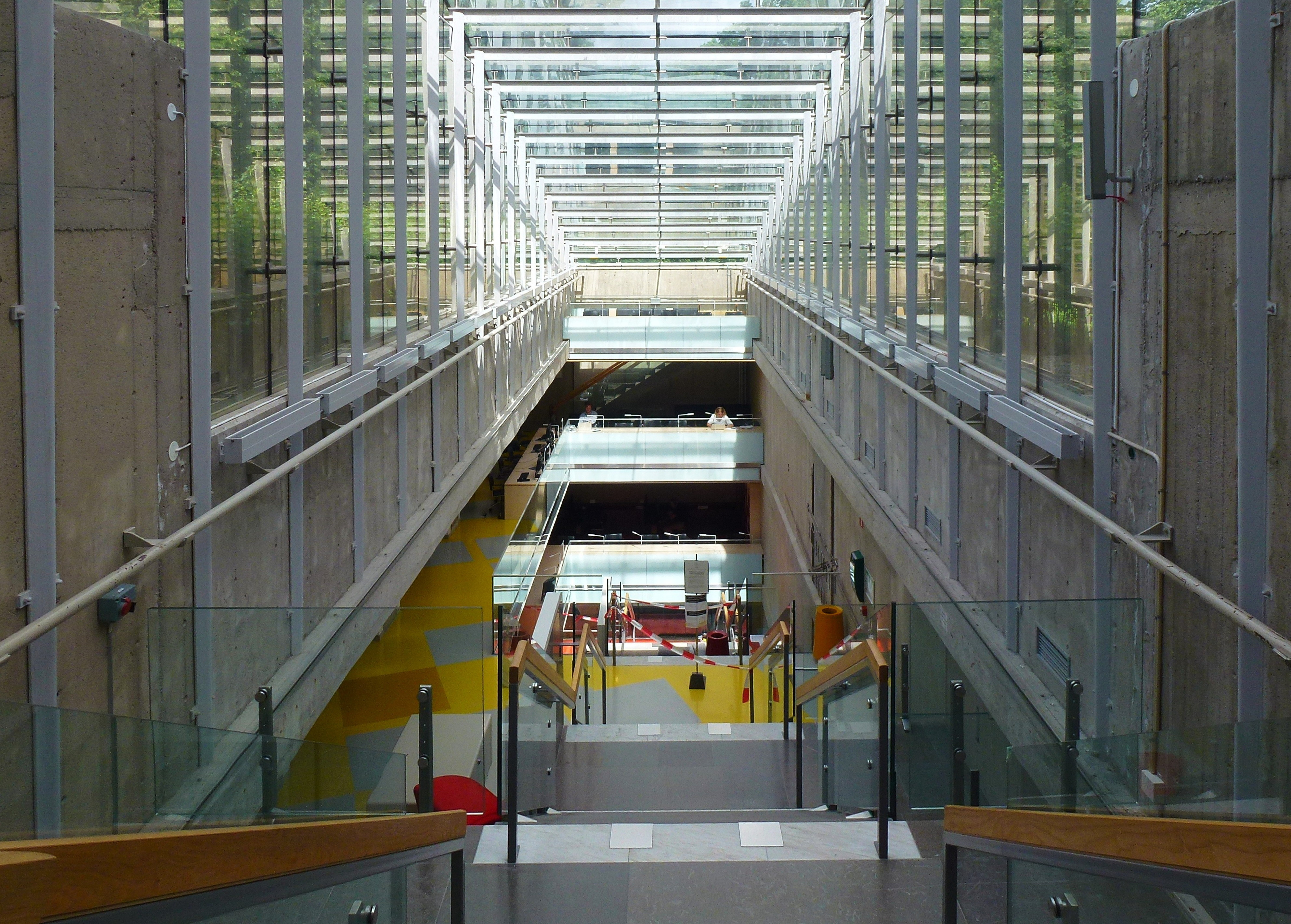 Kungliga Biblioteket, trappen ner till Annexet